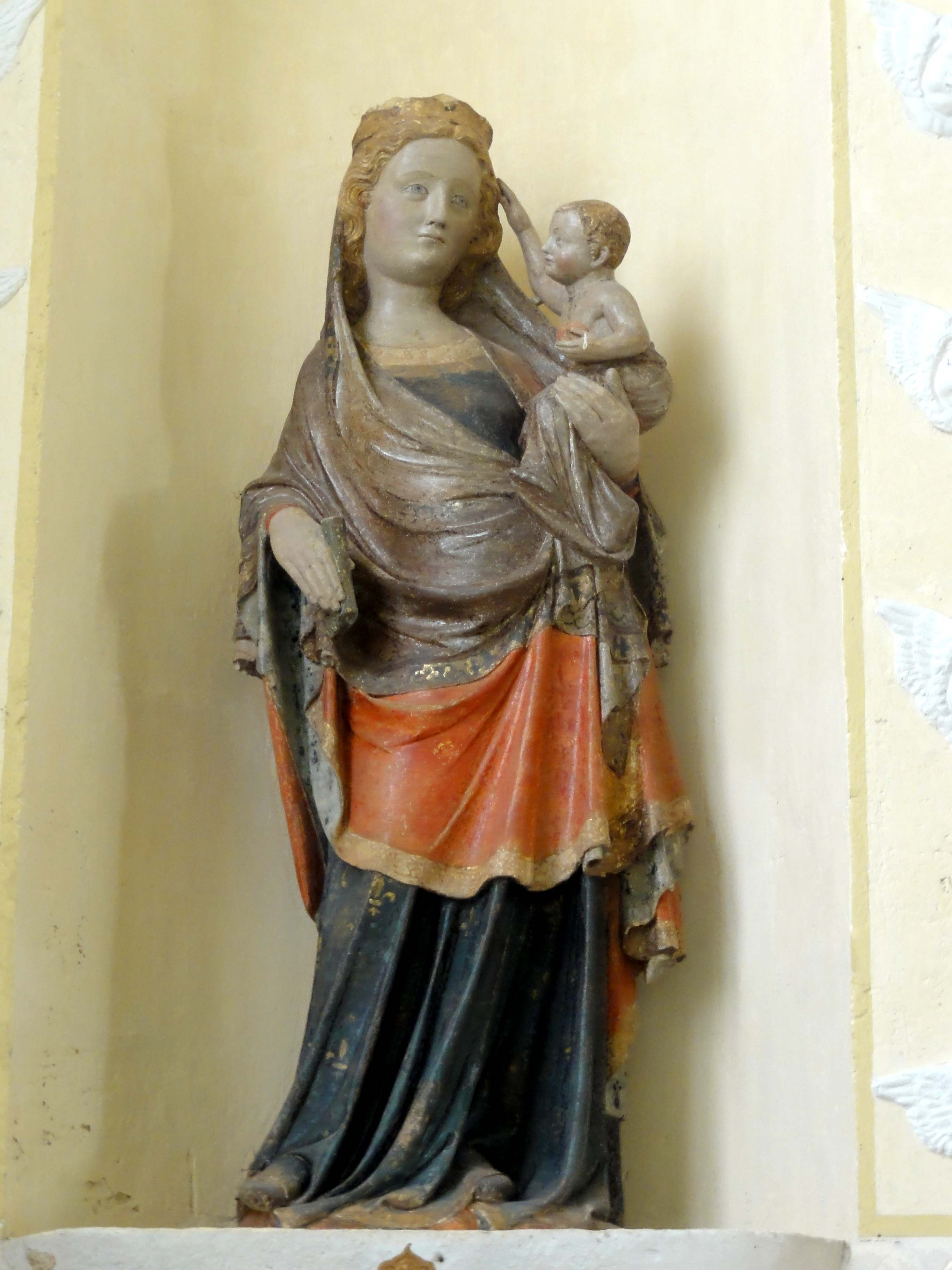 Mobilier de l'église (voir titre).